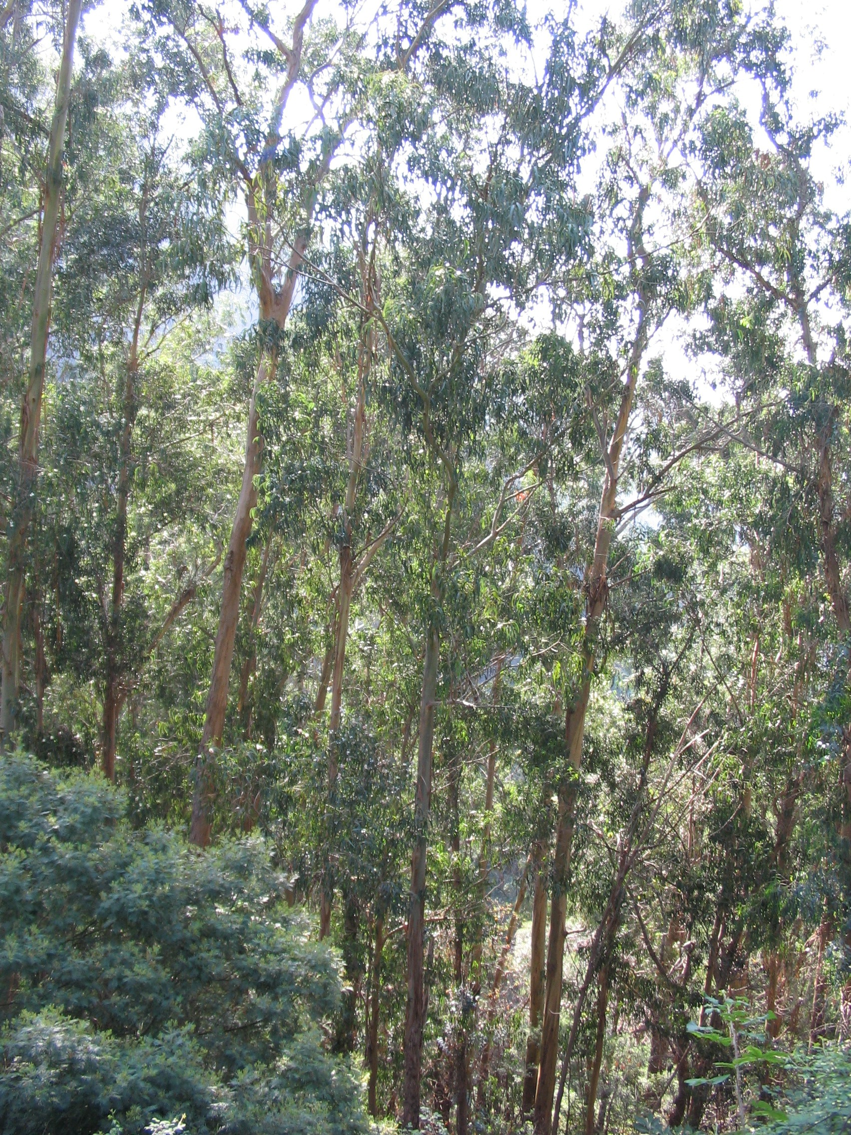 Eukaliptuszliget Madeirán (Cabo Girão)